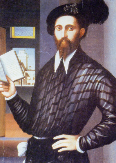 Torquato Tasso (1544-1594), Italian